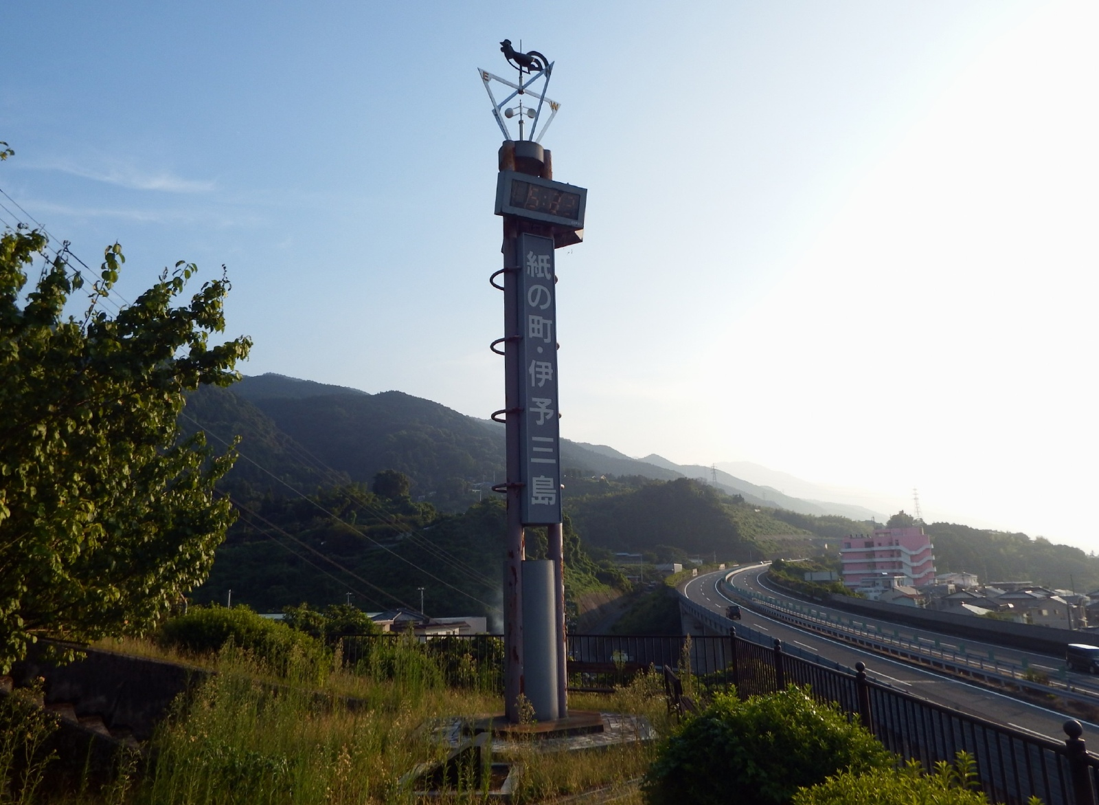 三島公園にある四国高速道路発祥地の碑